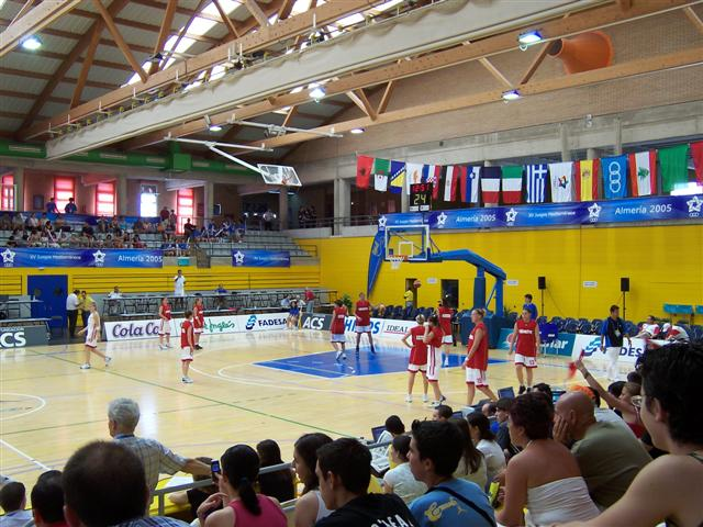 categoria:Immagini dei Giochi del Mediterraneo